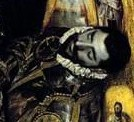 ==Detalle de Gonzalo Ruiz de Toledo en la pintura El entierro del conde de Orgaz de El Greco